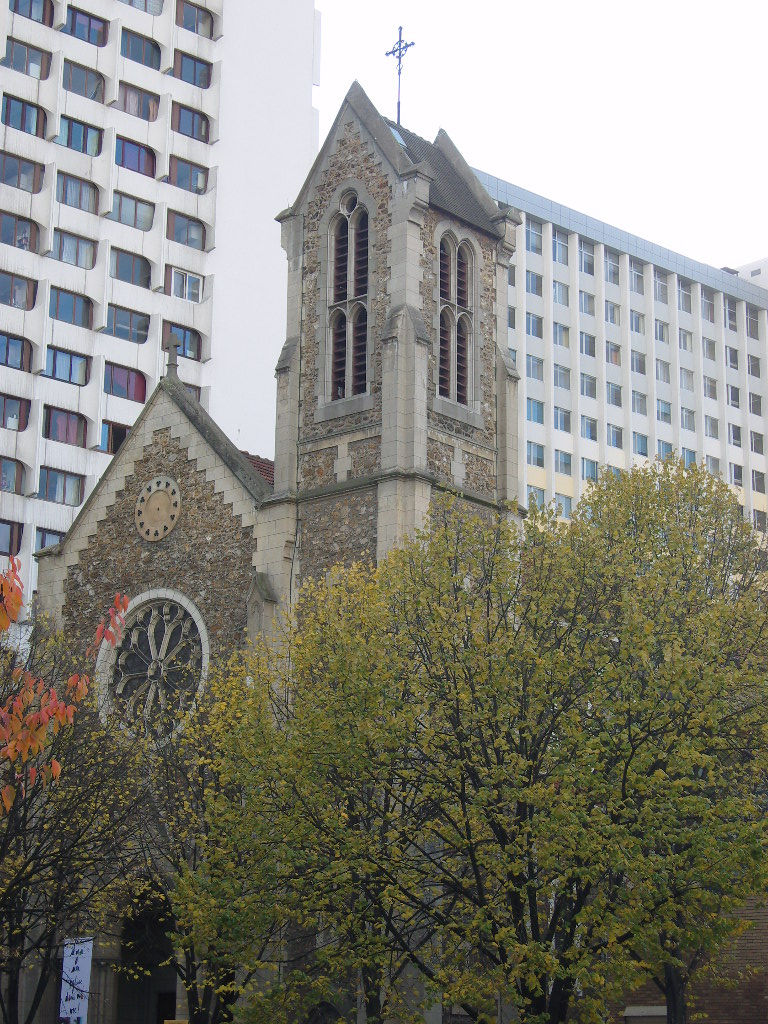 Paris 13e, église Saint-Hippolyte, avenue de Choisy